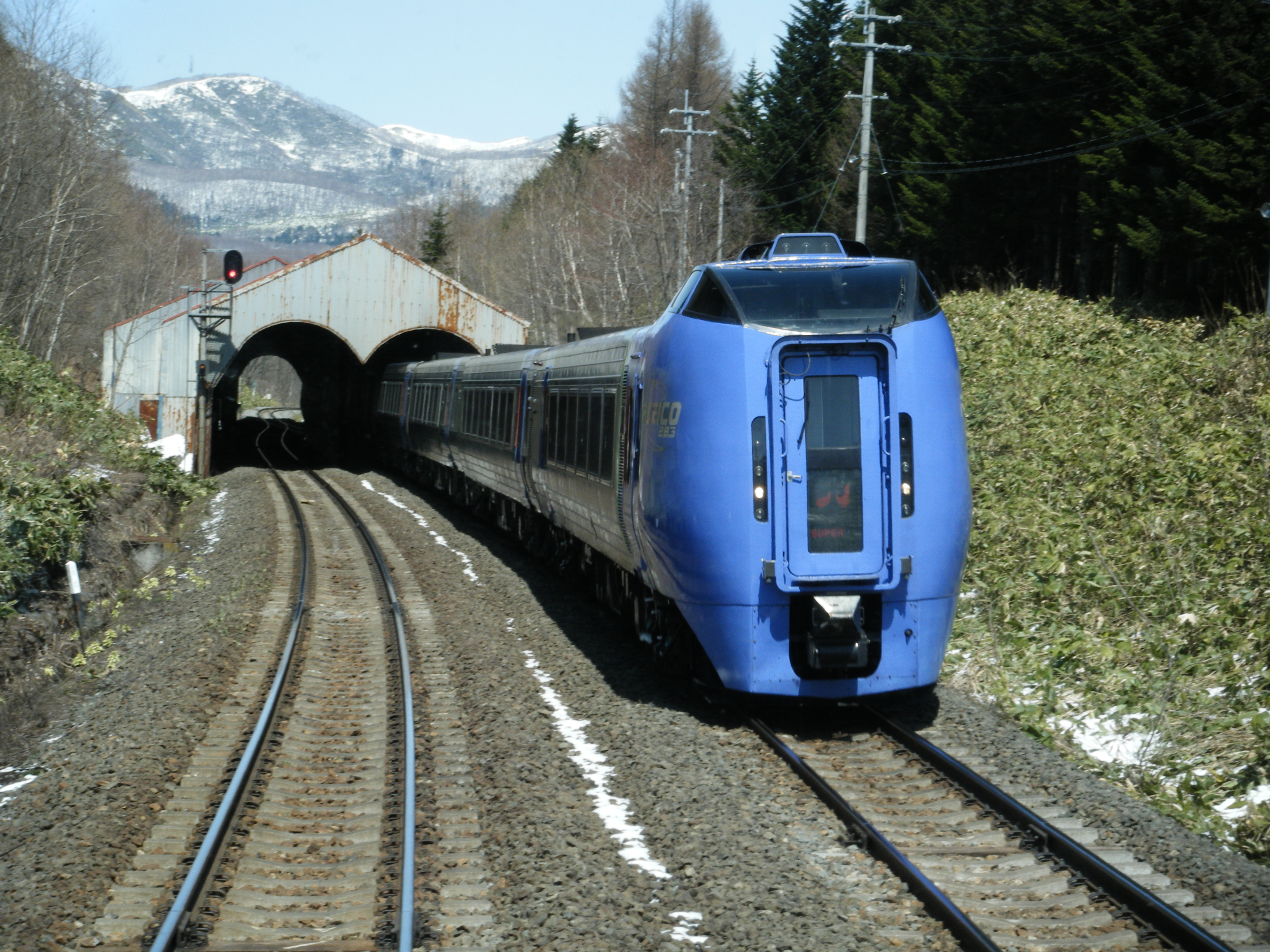 スーパーおおぞら4号。西新得信号場にて列車内から撮影。